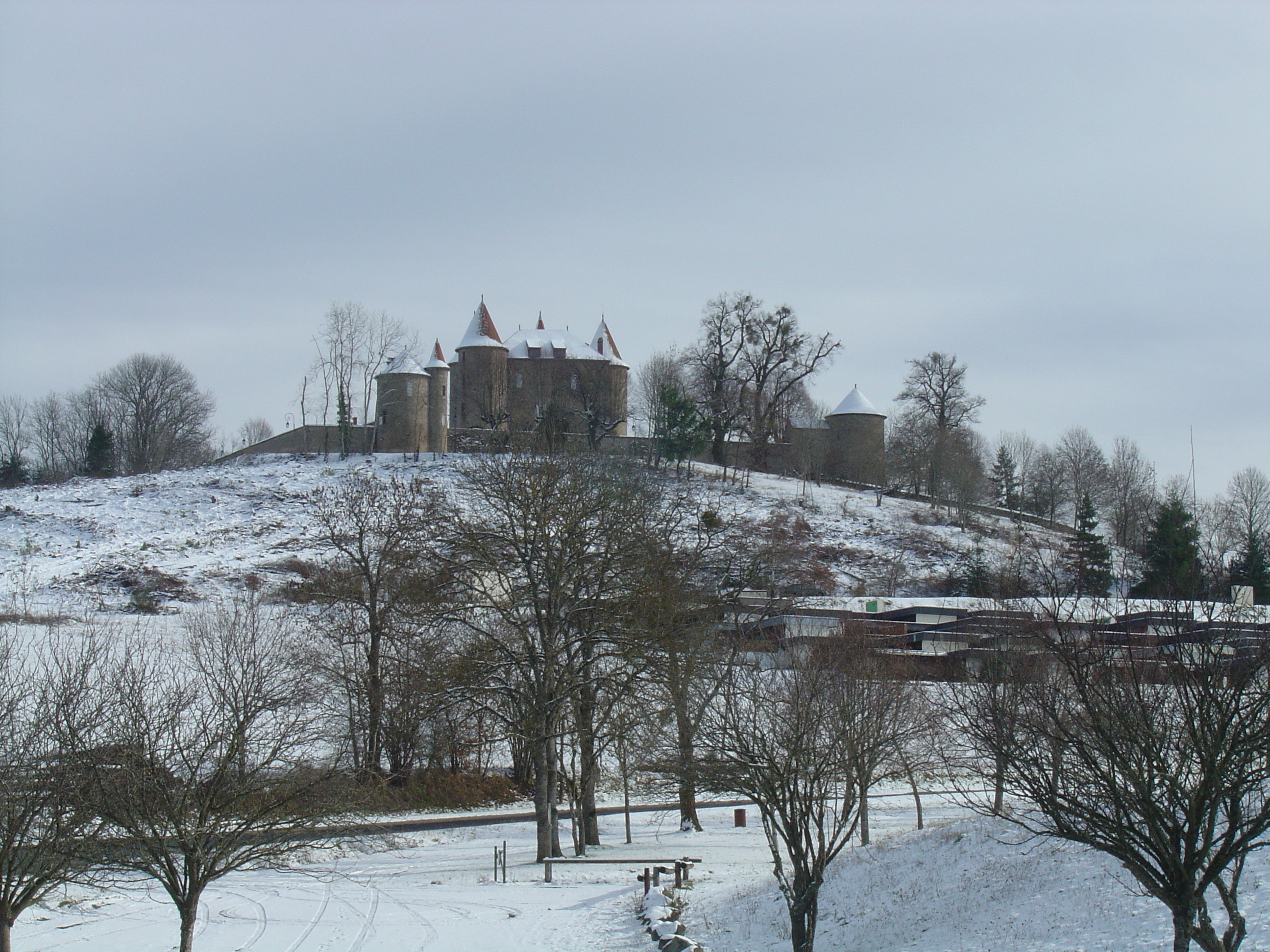 Château de Vernet-la-Varenne et gîtes pus bas